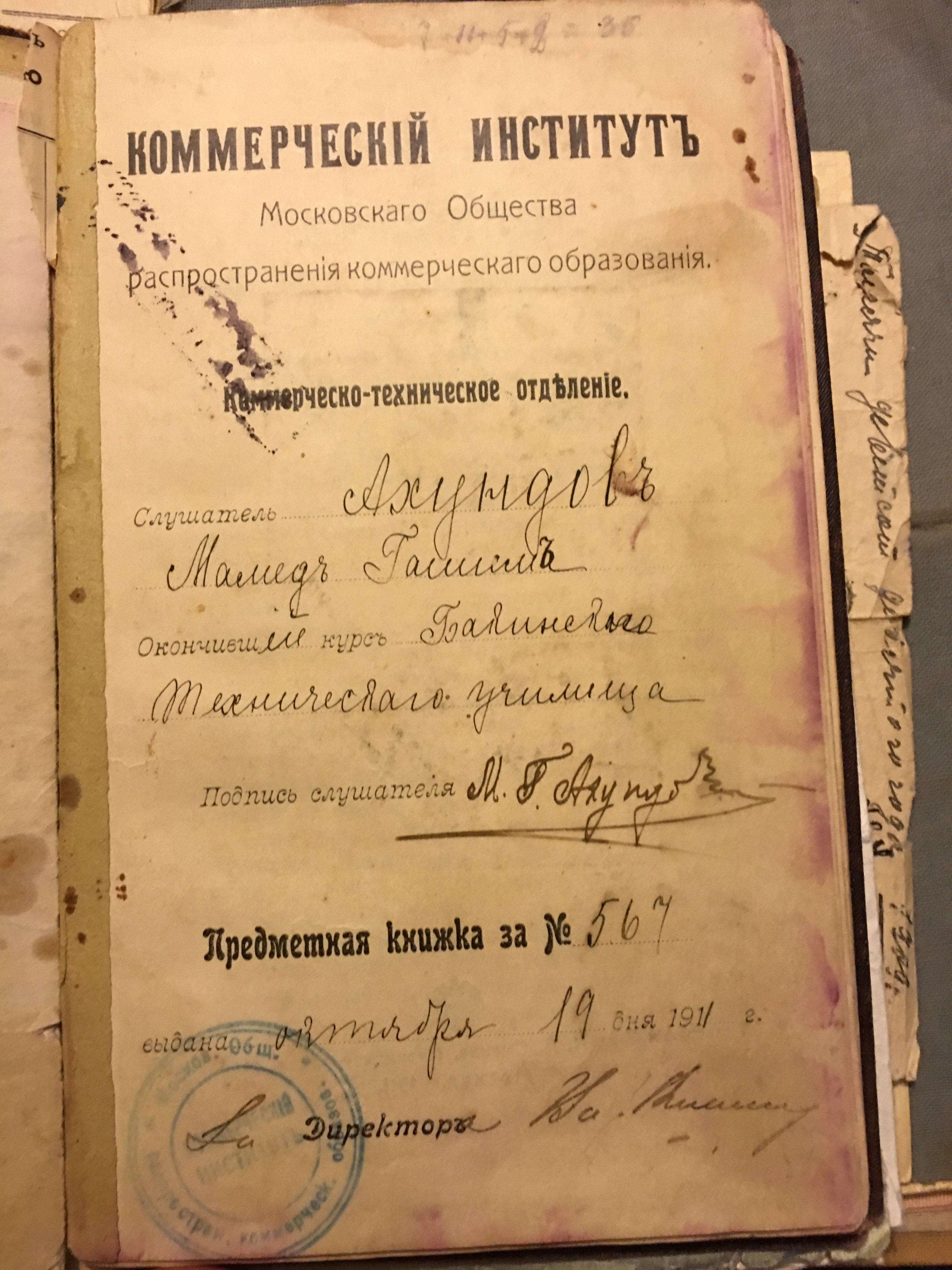 Аналог современной зачетной книжки. Документу более 100 лет.